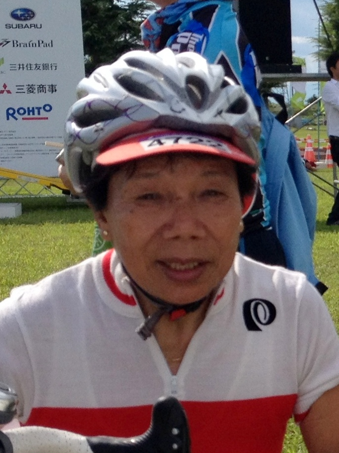 ツールド東北100kmゴール後に撮影